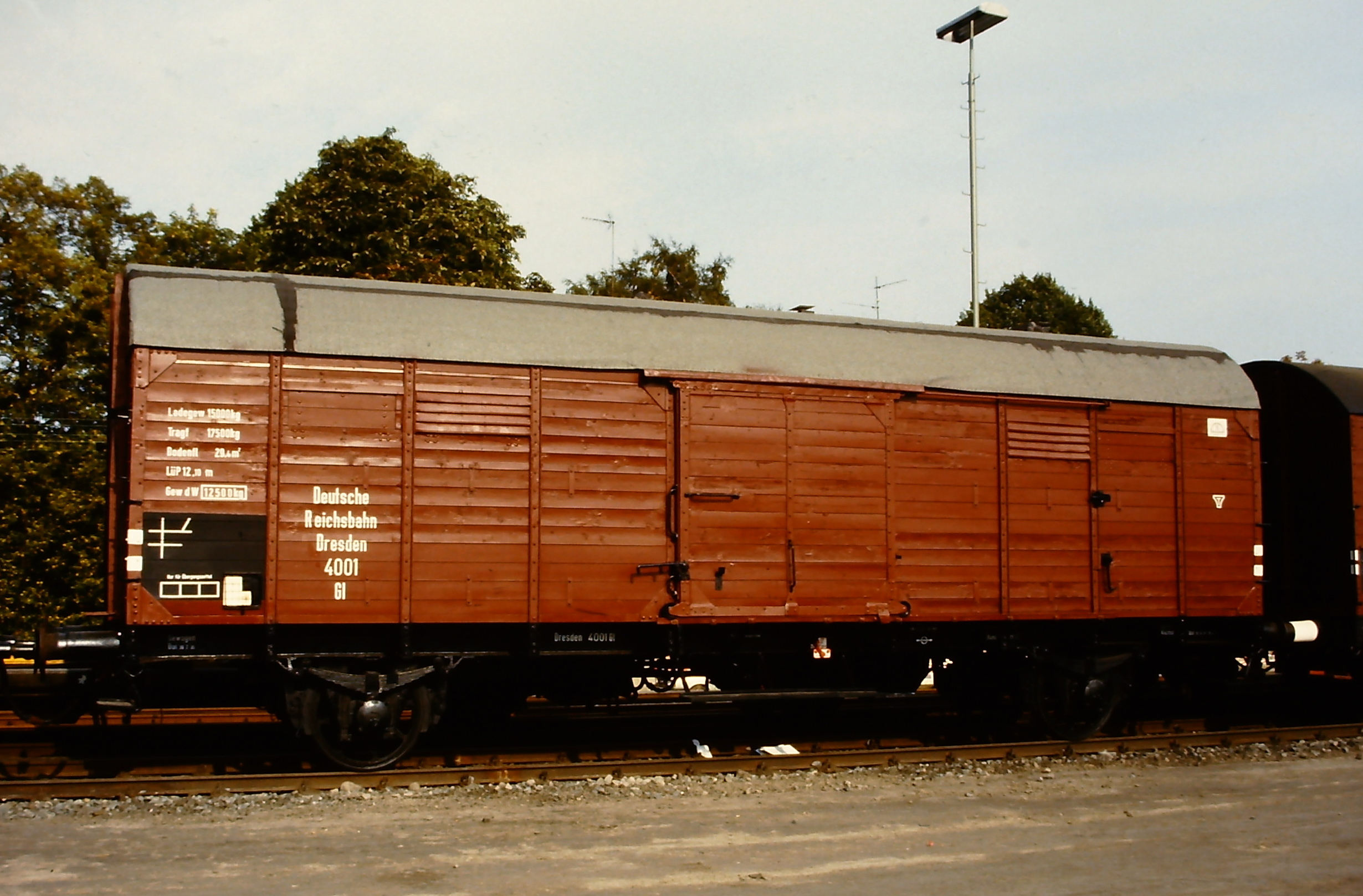 Gedeckter Güterwaggon (Gattung Gl Dresden), ausgestellt auf der Fahrzeugschau 150 Jahre deutsche Eisenbahn in Bochum-Dahlhausen